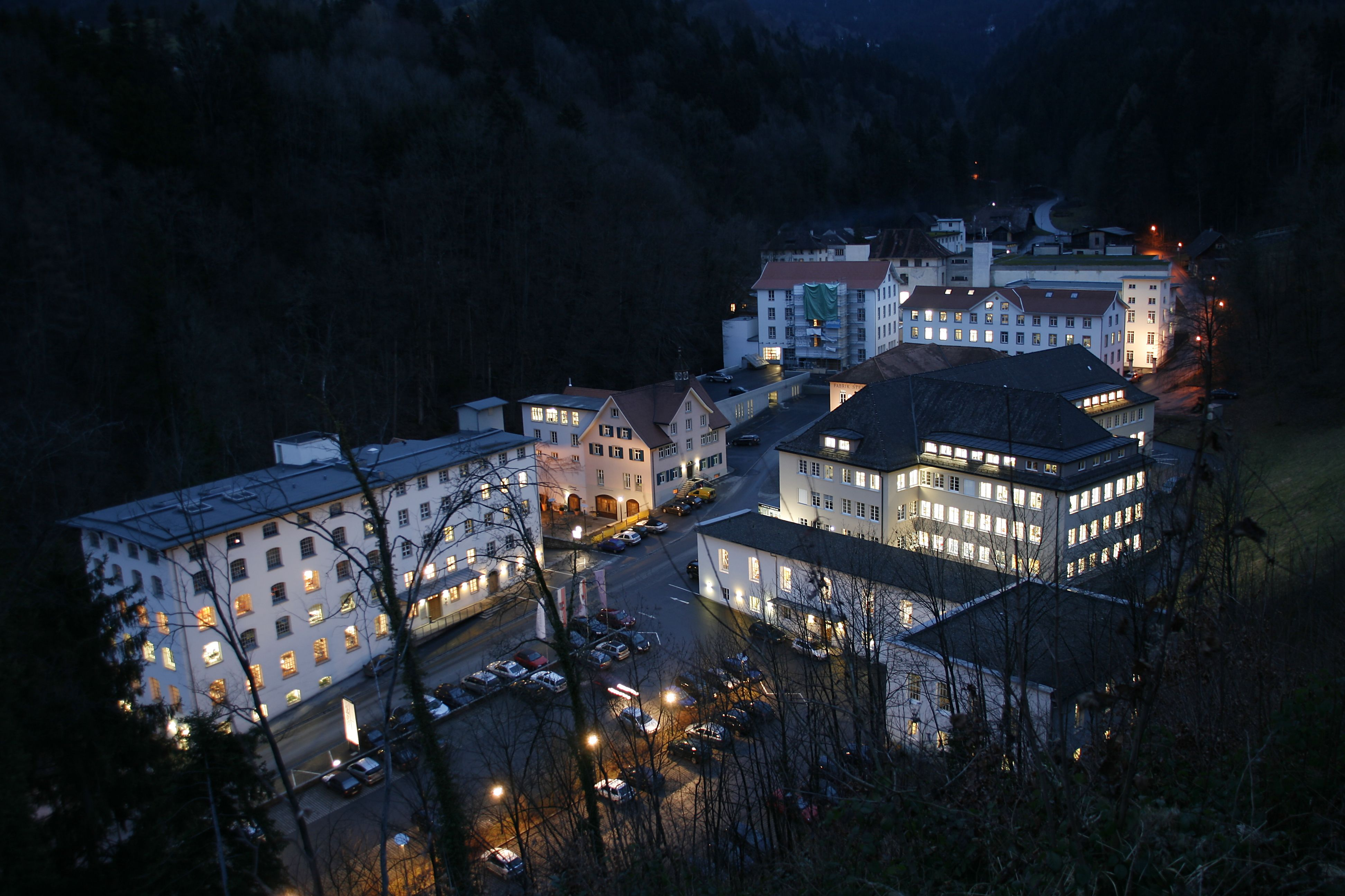 ehemals Textilfabrik der Firma F.M.Hämmerle im Steinebach; Dornbirn, Vorarlberg.